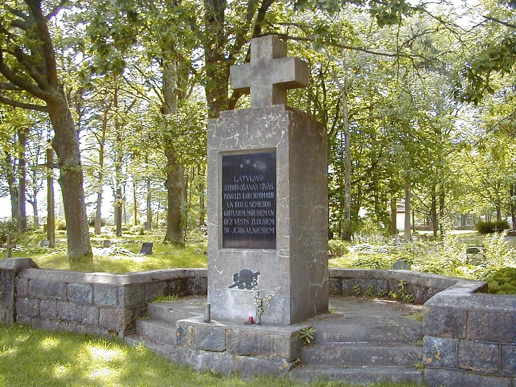 Jūrkalne, piemineklis karu un revolūciju upuriem 2000-07-09